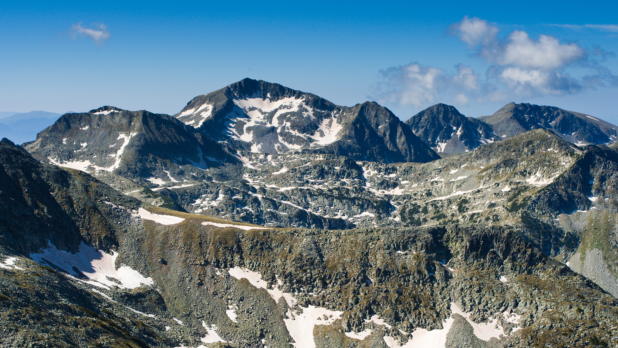 Пирин, Каменица в Пирин планина